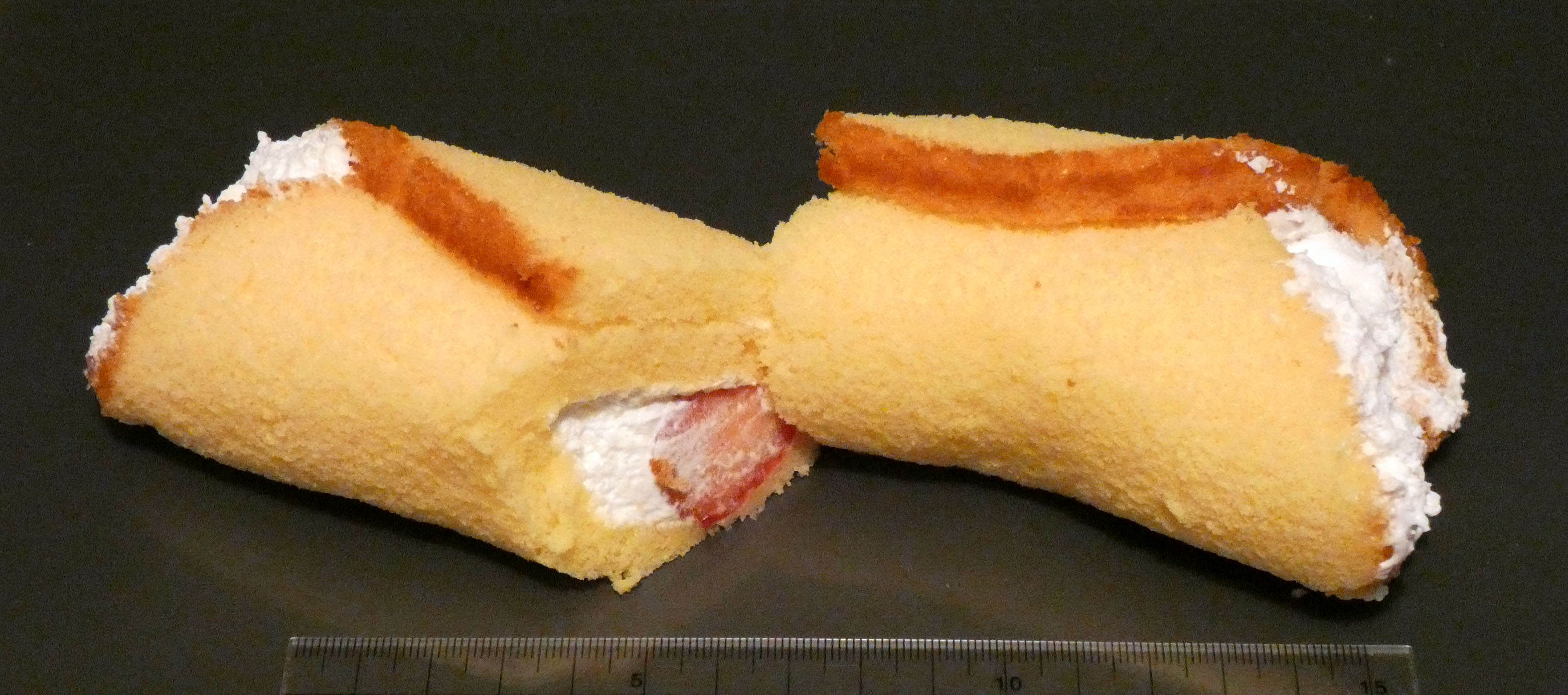 山崎製パンの「まるごと苺」